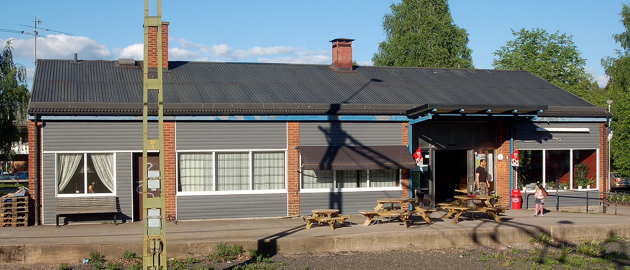 Järnvägstationen i Degerfors, Sverige. Degerfors railway station, Sweden.